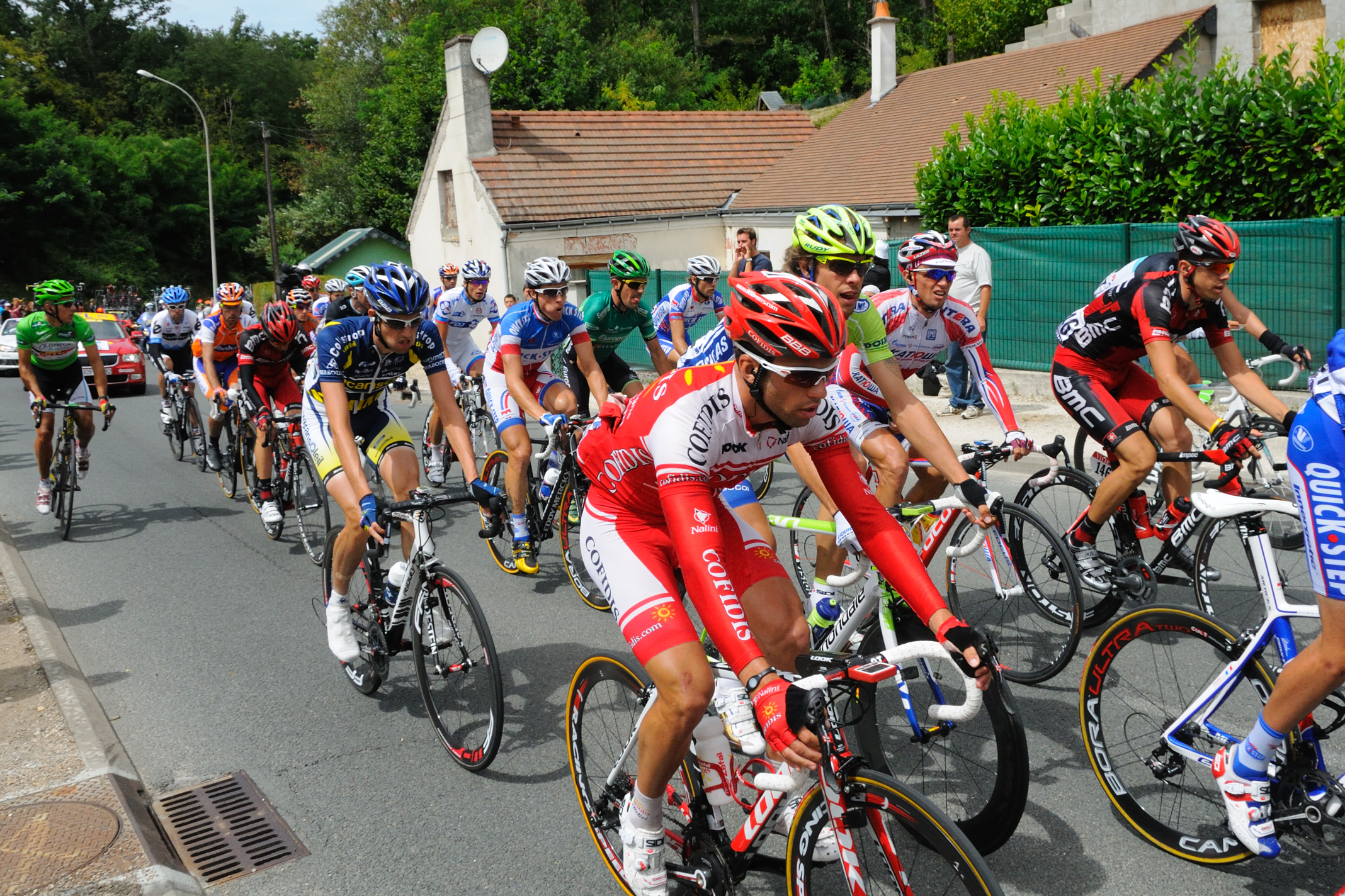 7e étape du Tour de France 2011 (Le Mans - Châteauroux) Le peloton dans la côte à la sortie de Chaumont (Loir-et-Cher)